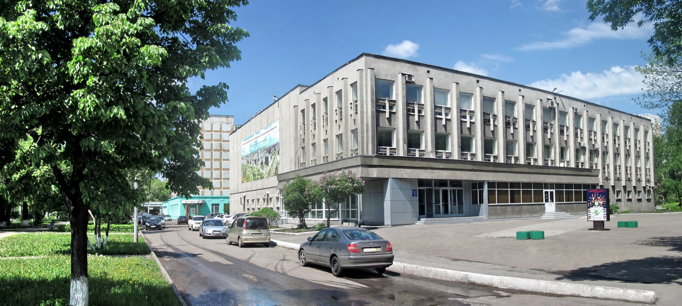 НФИ КемГУ